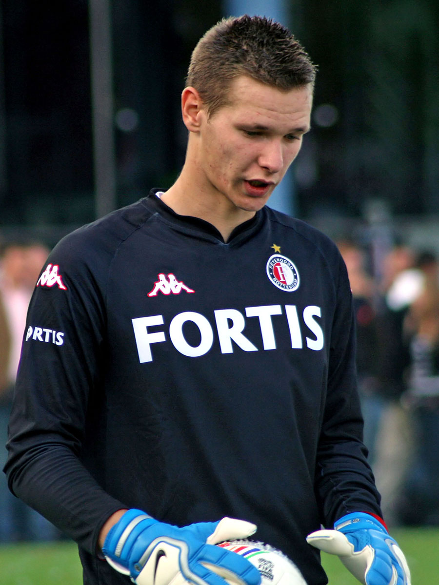 Erwin Mulder (Feyenoord)